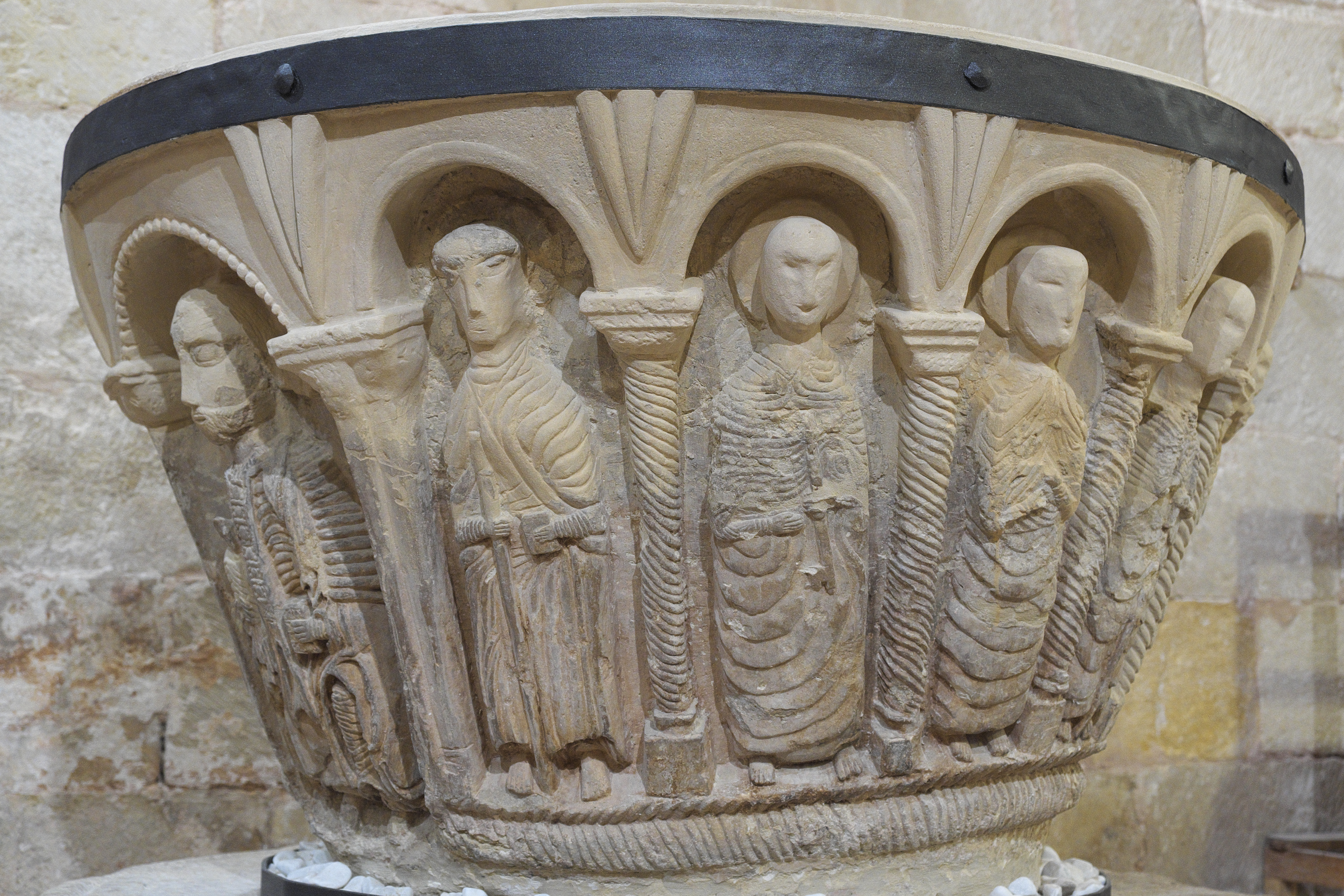 Kirche San Juan Bautista (Johannes der Täufer) in Moarves de Ojeda (Olmos de Ojeda) in der Provinz Palencia (Kastilien-León/Spanien), romanischer Taufstein (oberer Teil erneuert)